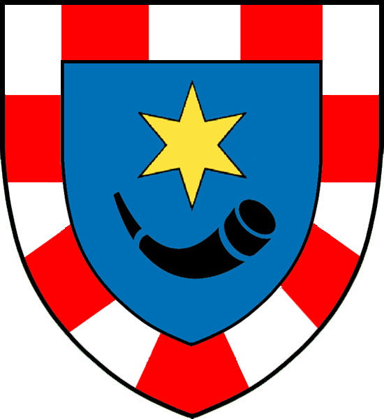 Vapensköld för friherrliga ätten Carpelan